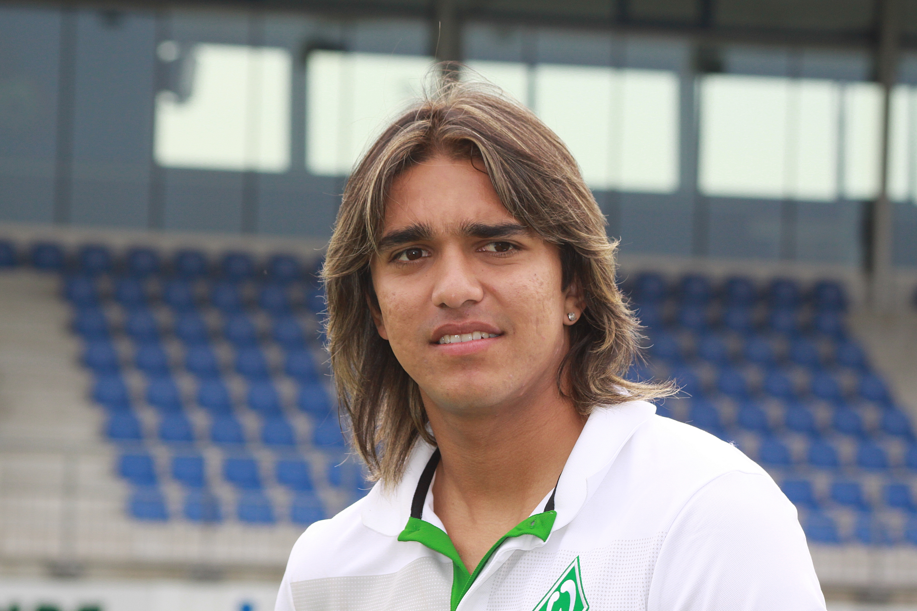 de: Marcelo Moreno Martins - SV Werder Bremen (2)